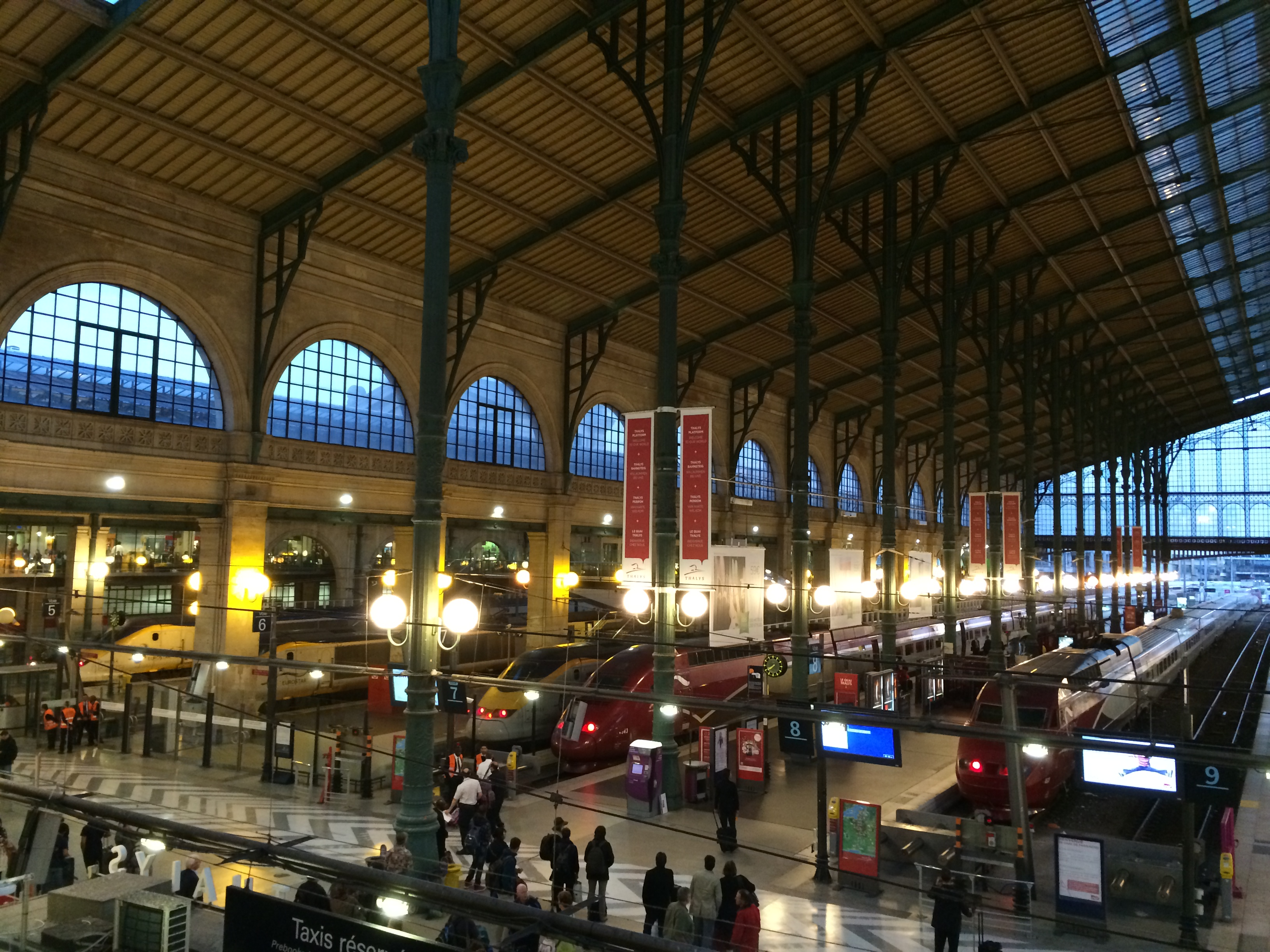 Gare du Nord, départ Eurostar et Thalys